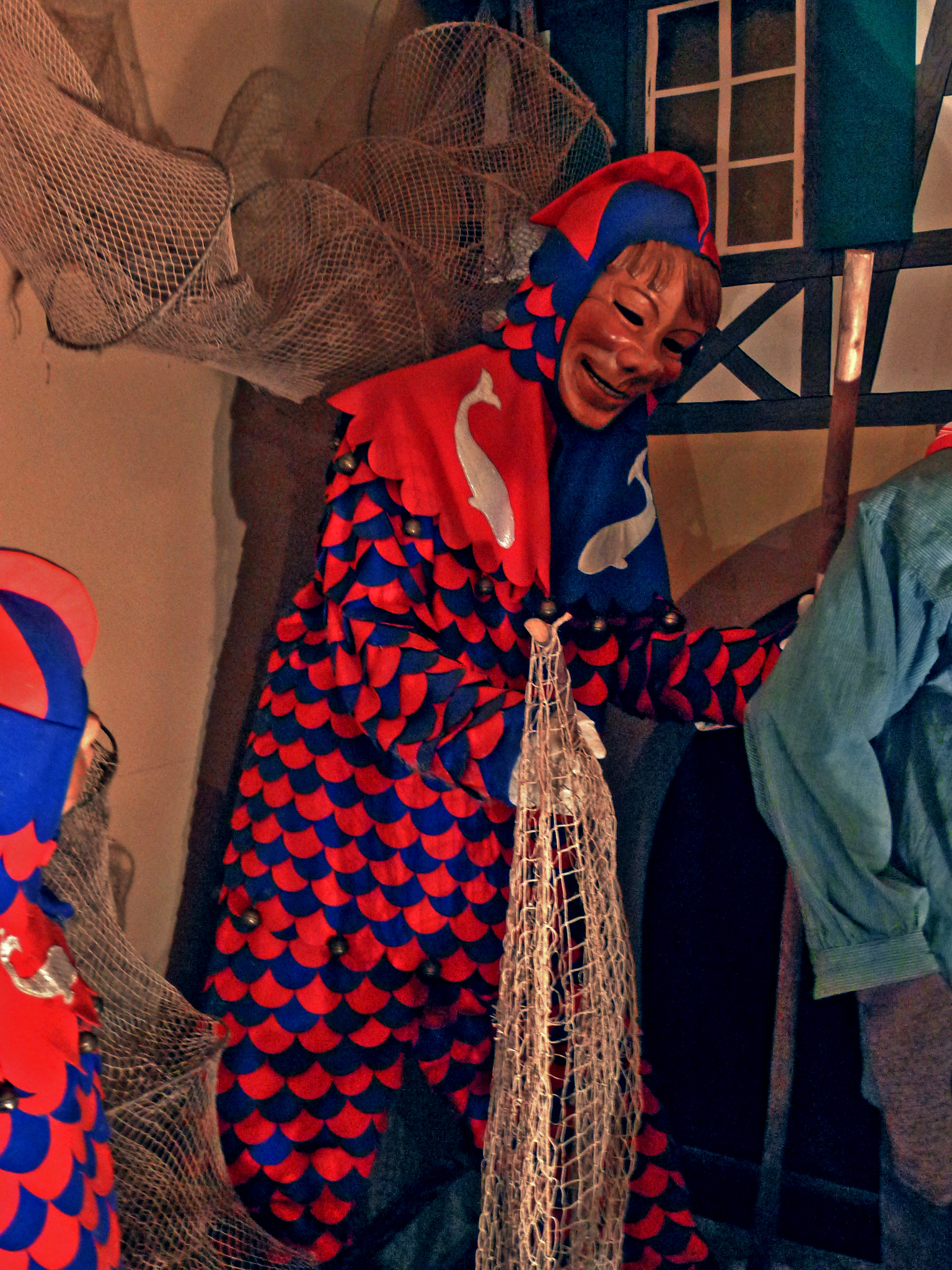 Häs der Fischerbuebe, einer Figur der Narrenzunft Welle-Bengel Kenzingen, hier in der Oberrheinischen Narrenschau Kenzingen, dem Fasnetmuseum der Vereinigung Oberrheinischer Narrenzünfte, ausgestellt. Die Figur erinnert an die Fischerzunft, die vor mehreren hundert Jahren in Kenzingen existierte.